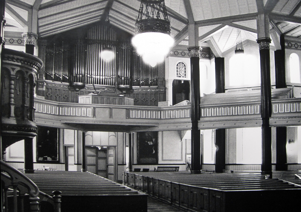 Caroli kyrka Malmö 1990 efter renovering.